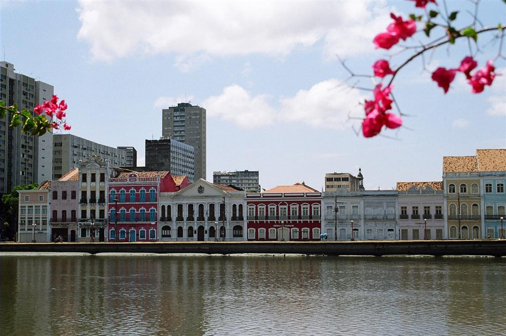 Aurora Street in Recife, Brazil